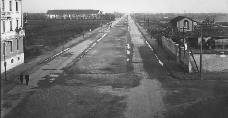 Milano, viale Forlanini. Ripresa del viale Forlanini dai Tre Ponti. Sulla sinistra il civico 1, esistente tutt'ora.